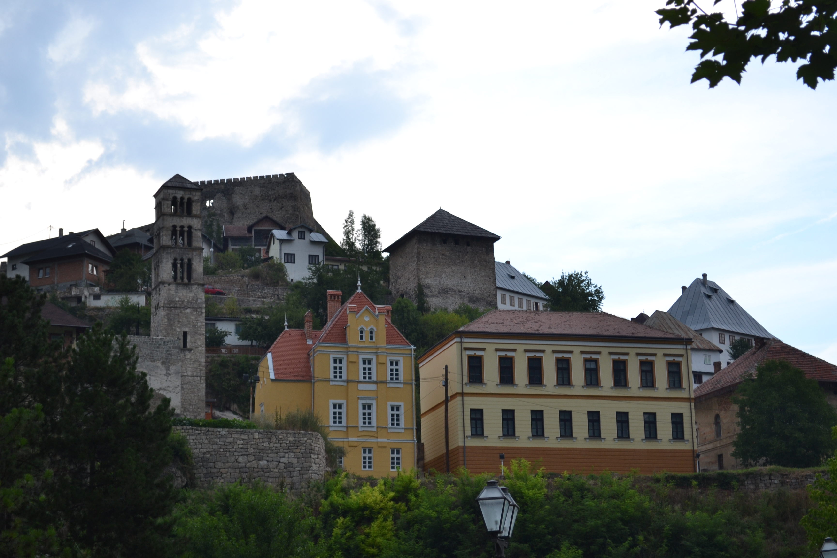 Јајце, тврђава